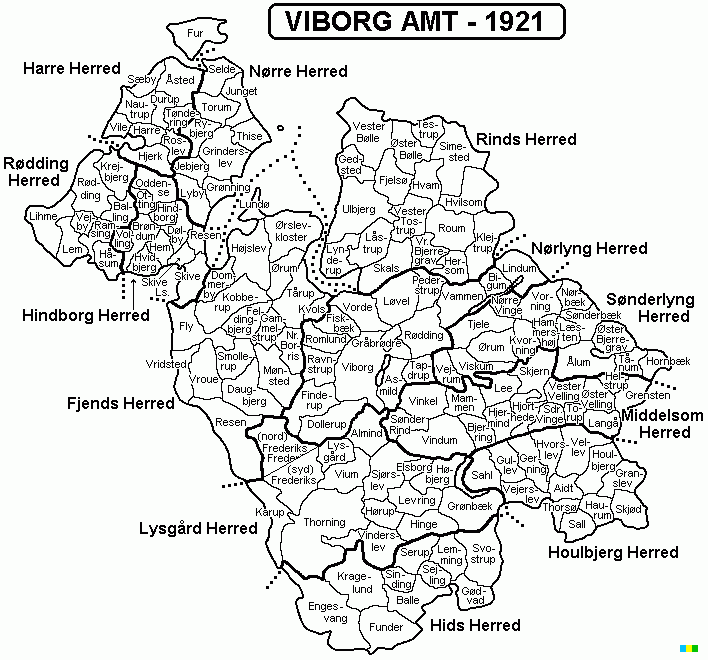 Kort over Viborg Amt